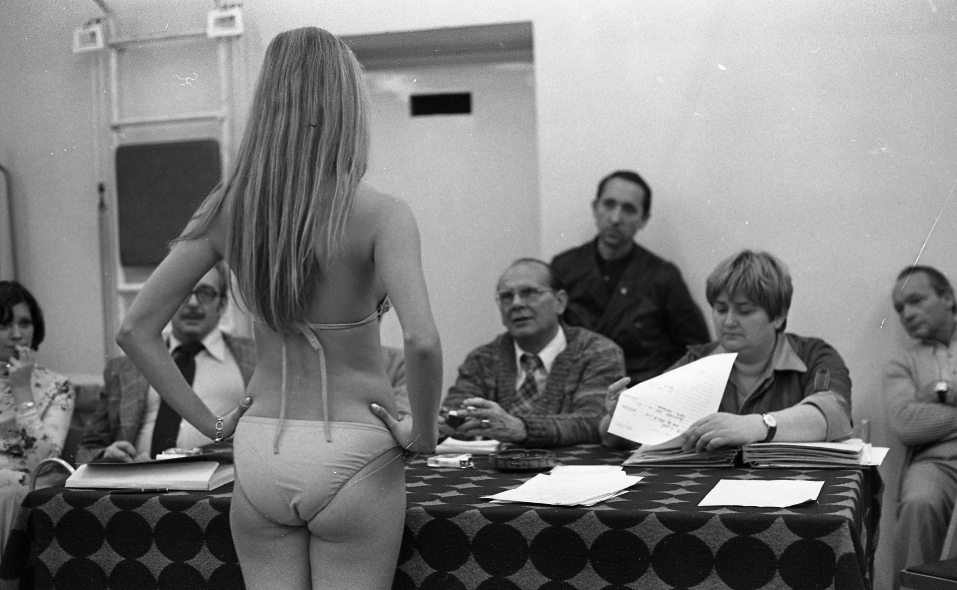 Állami Artistaképző Intézet (ma Baross Imre Artistaképző Szakközépiskola és Szakiskola). Manökenjelöltek felvételi vizsgája, Sütő Enikő (háttal), szemben Baross Imre igazgató.